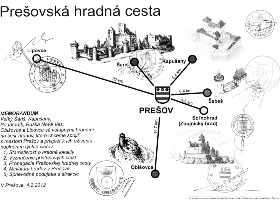 Digitalizovaný detail z verejnej informačnej tabule. Prešovská hradná cesta.